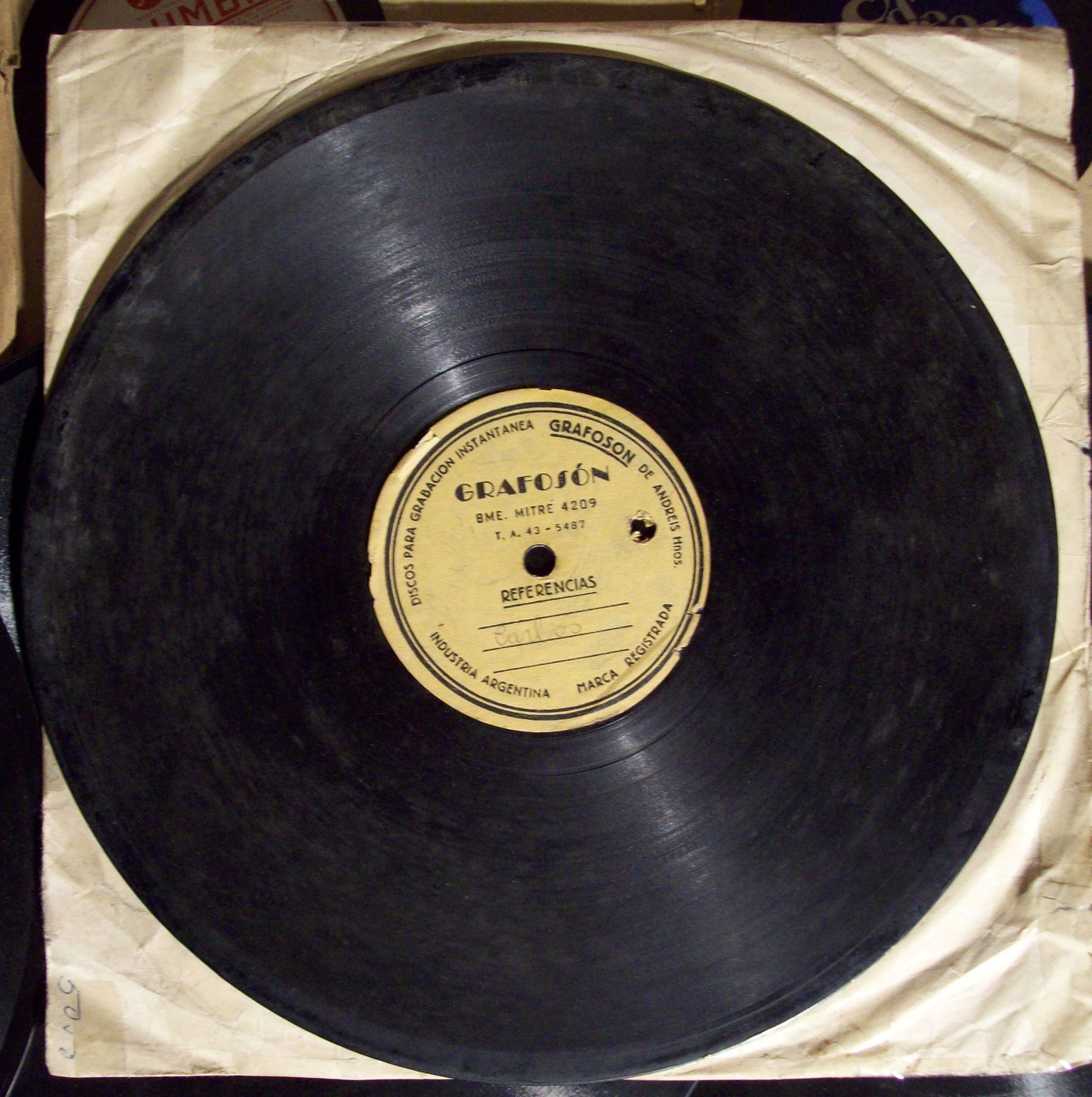 Grabación casera en un disco de acetato.